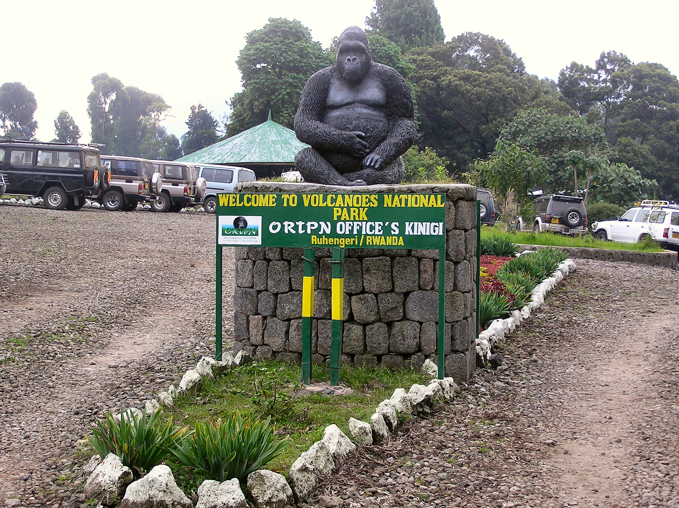 Entrée du Parc National des Volcans - Province du Nord - Rwanda